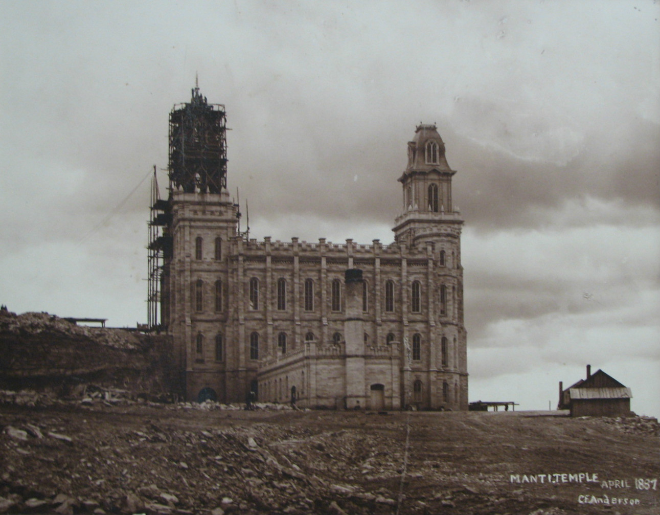 Imagen de la construcción del templo de Manti